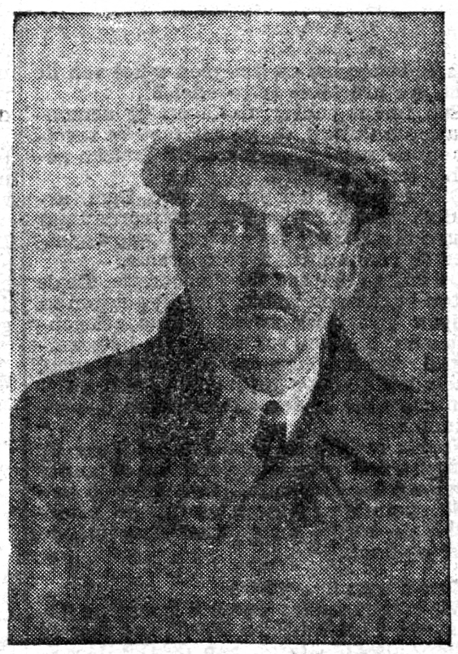 Nāhuatl: Dirk Schermerhorn (1934)